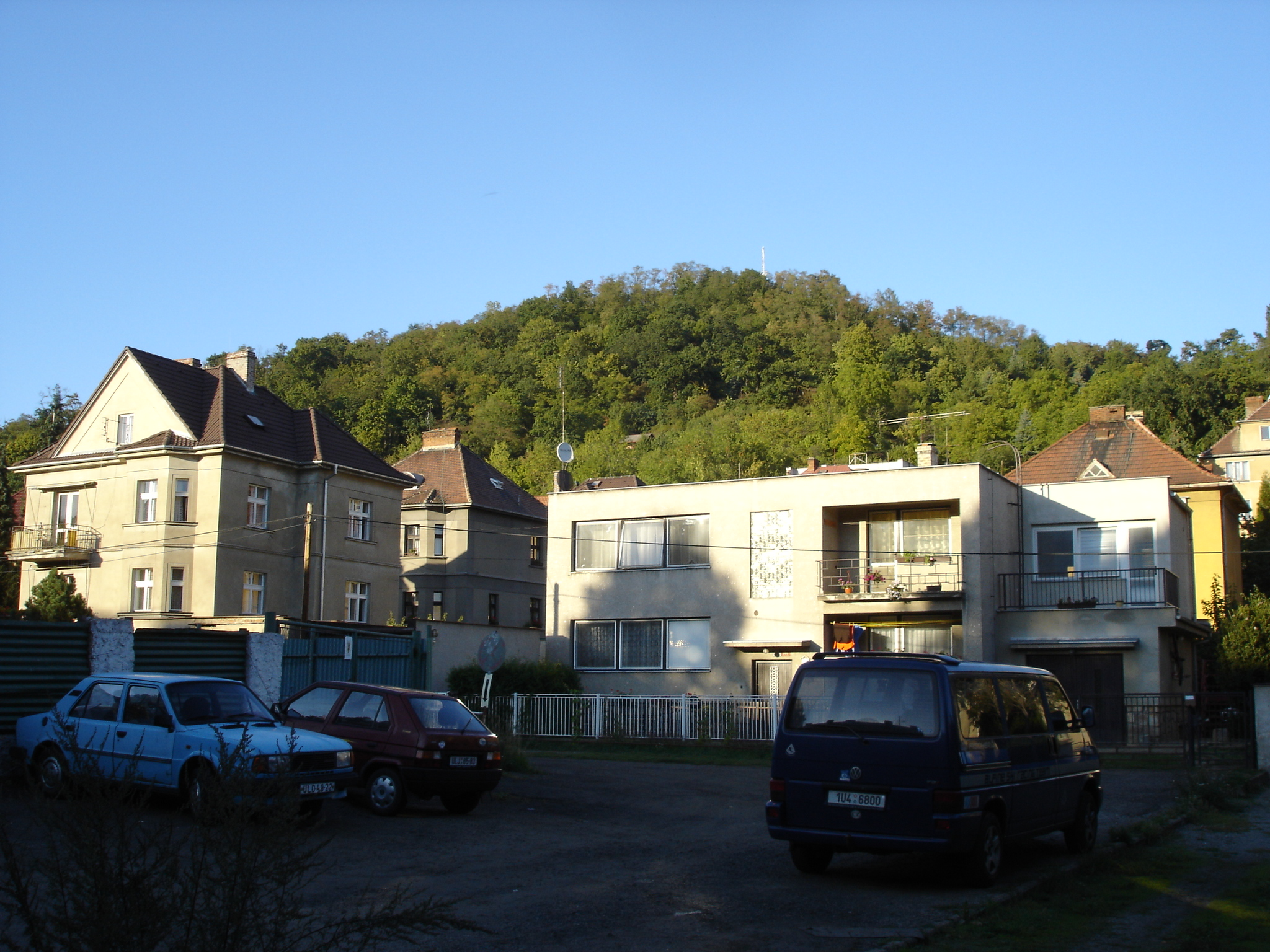 Jižní svah Holoměře. Foceno 10.9.2006. Autor Pindick.